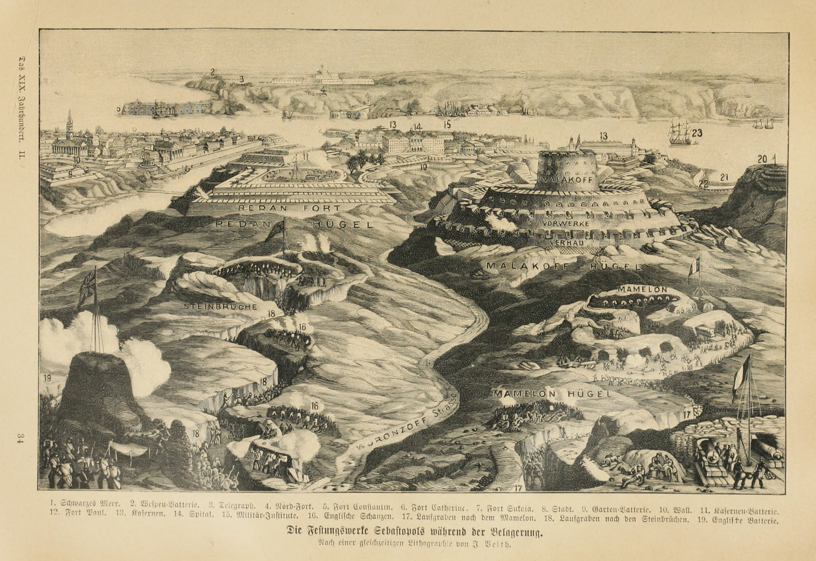 Die Festungswerke Sebastopols während der Belagerung